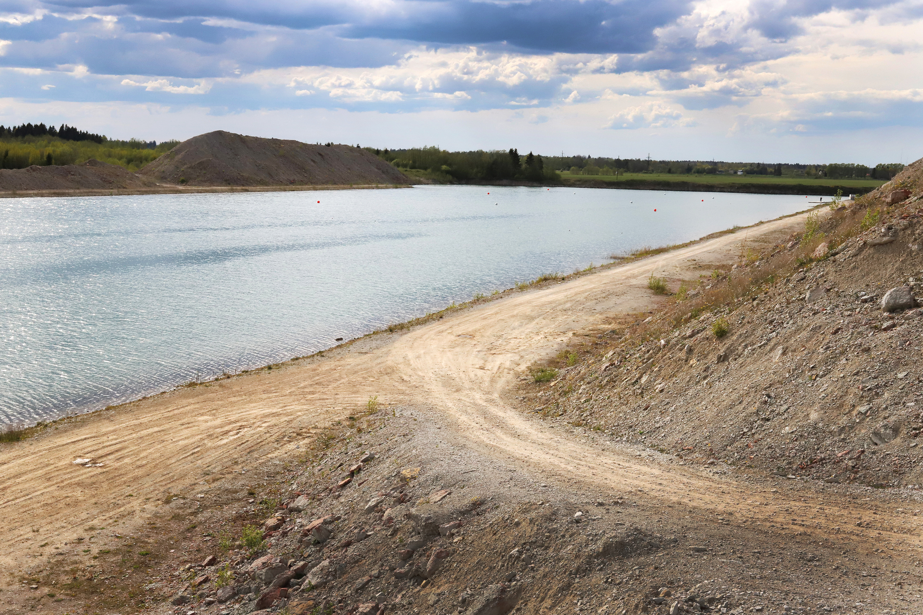 Aidu sõudekanali stardipaik, mai 2020